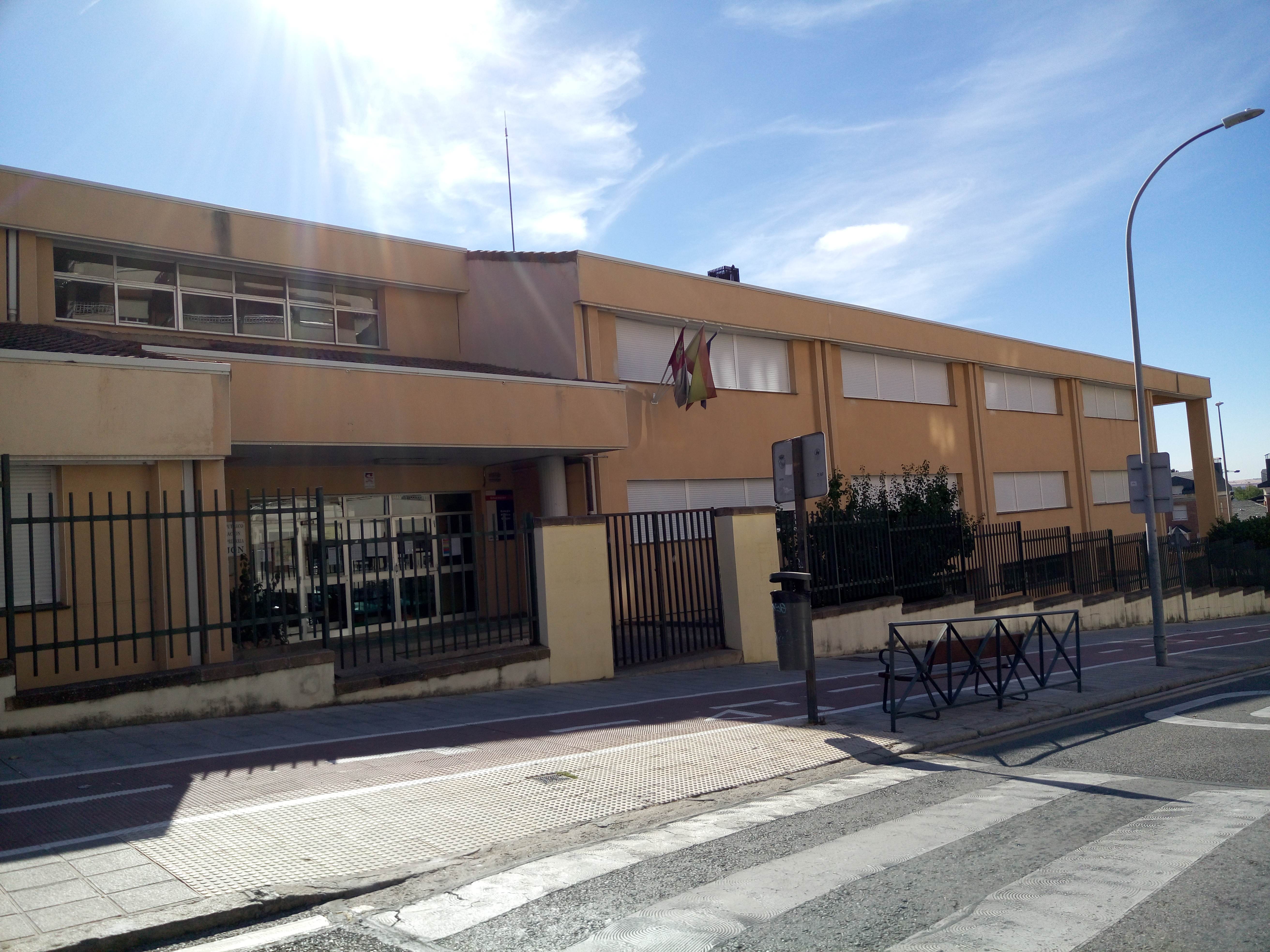 Colegio Público Ocejón. Guadalajara (España).